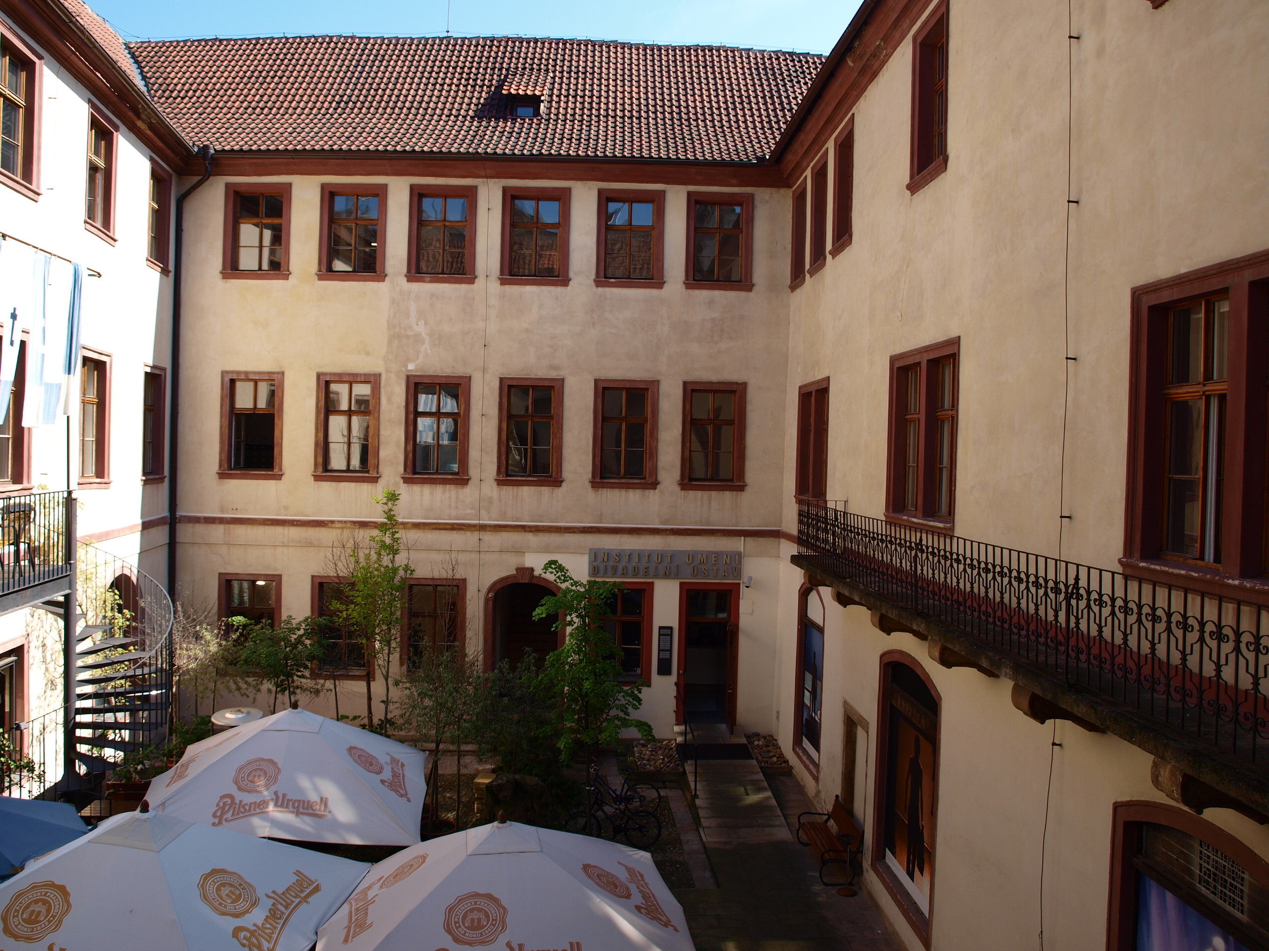 Menhartovský palác, Celetná